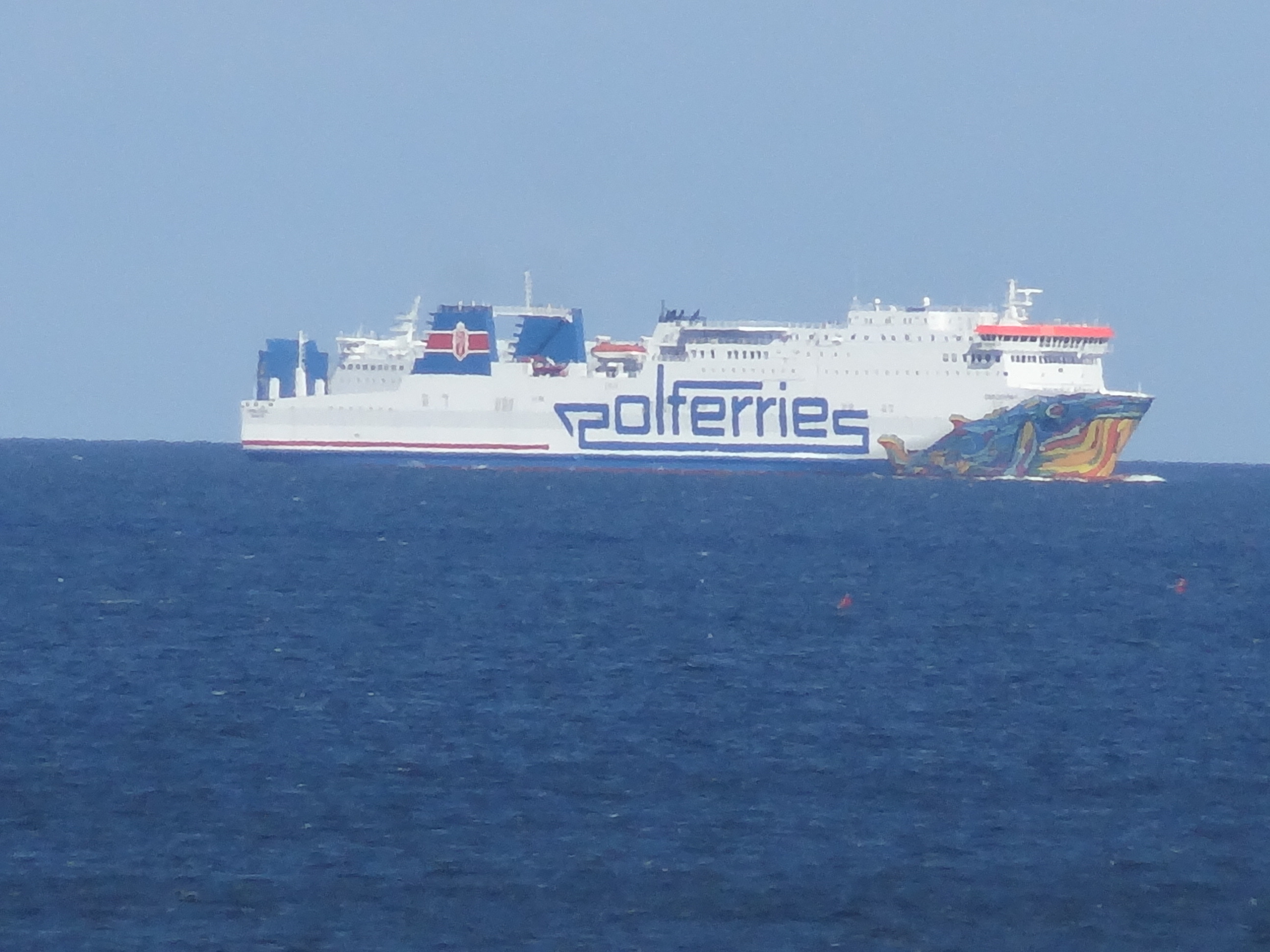 Polferries at Świnoujście